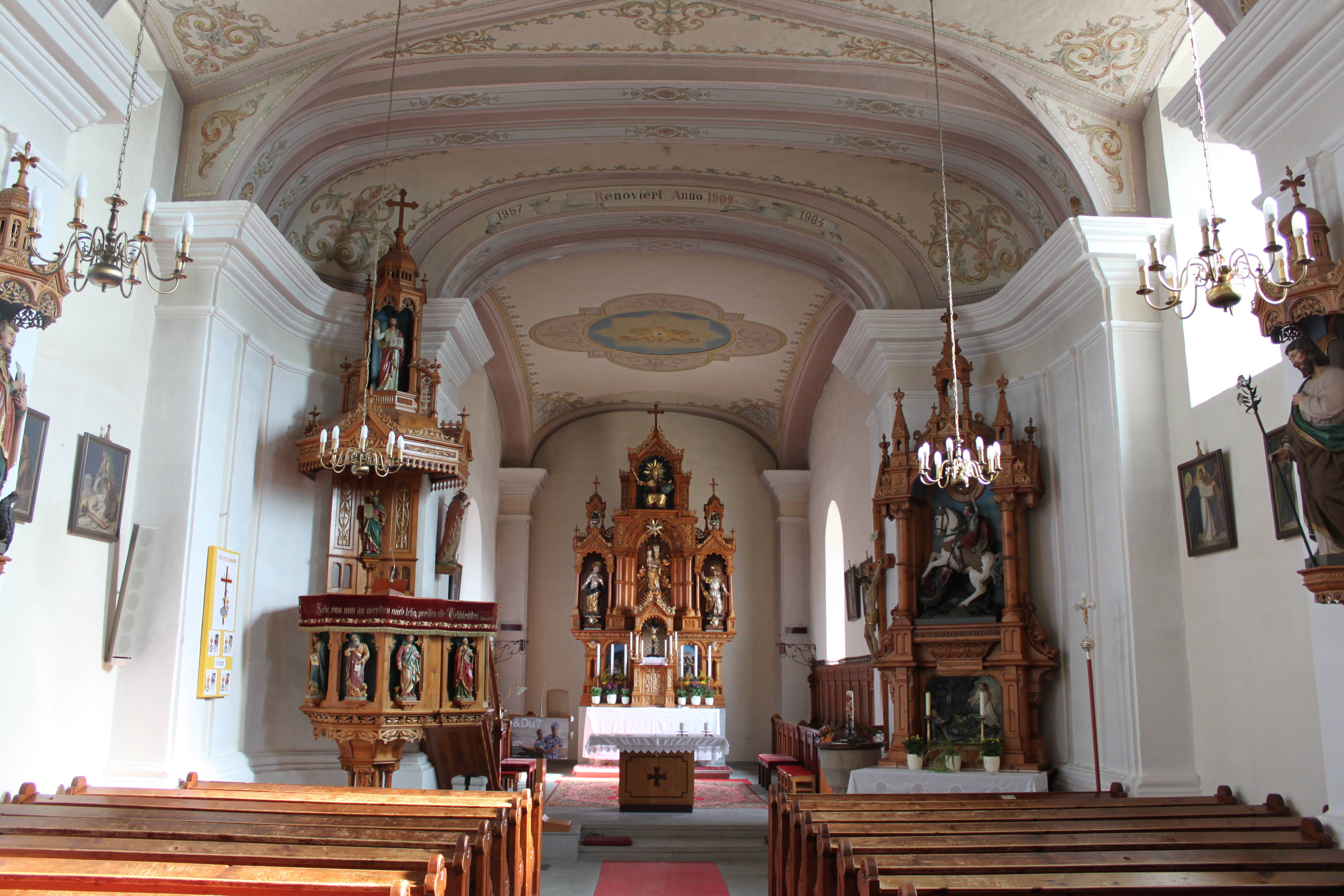 Wallfahrtskirche Mariä Heimsuchung, Langhaus zum Chor